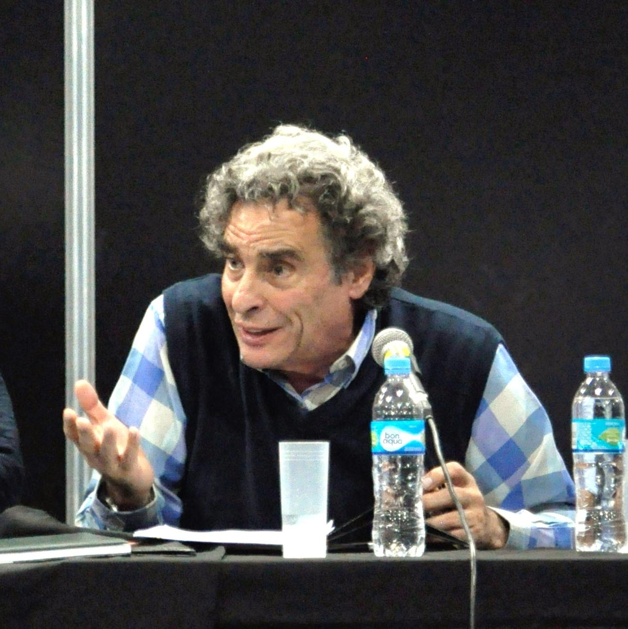 Eduardo Jozami (1939-), en la charla «Cortázar y Jauretche: Dos intelectuales, una pasión», en la Feria Internacional del Libro (Buenos Aires), el 29 de abril de 2014.